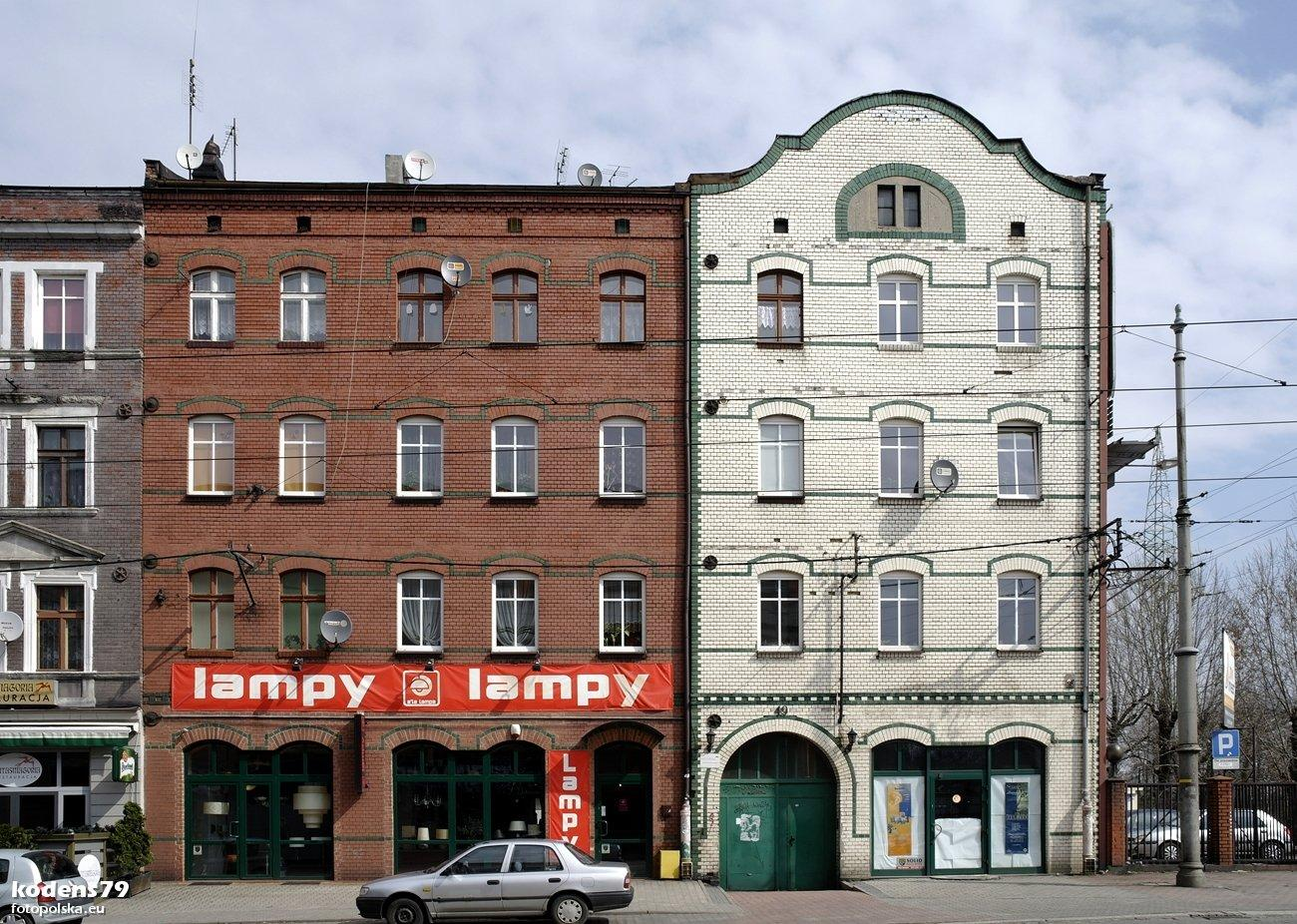 Ulica Gliwicka 49 w Katowicach